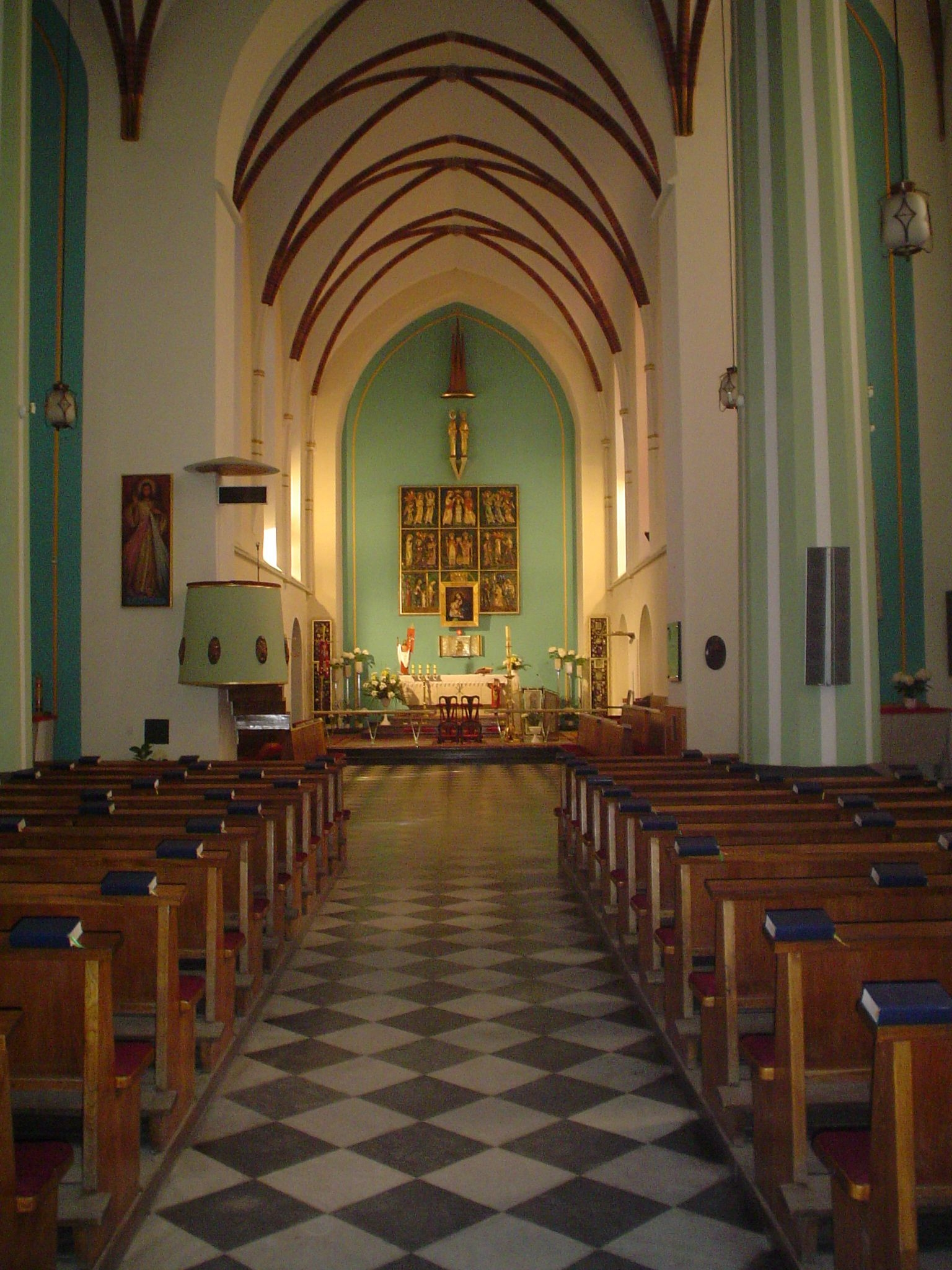 Kościół pw. Świetych Filipa i Jakuba w Żorach